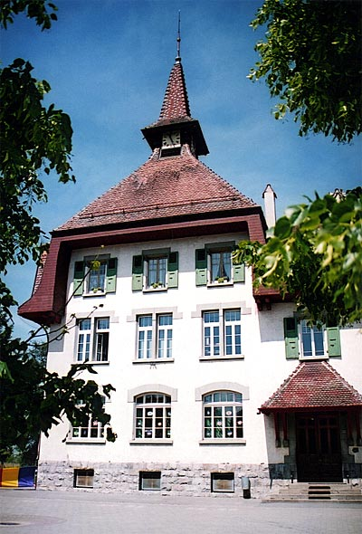 Schule von Bercher im Juni 2001